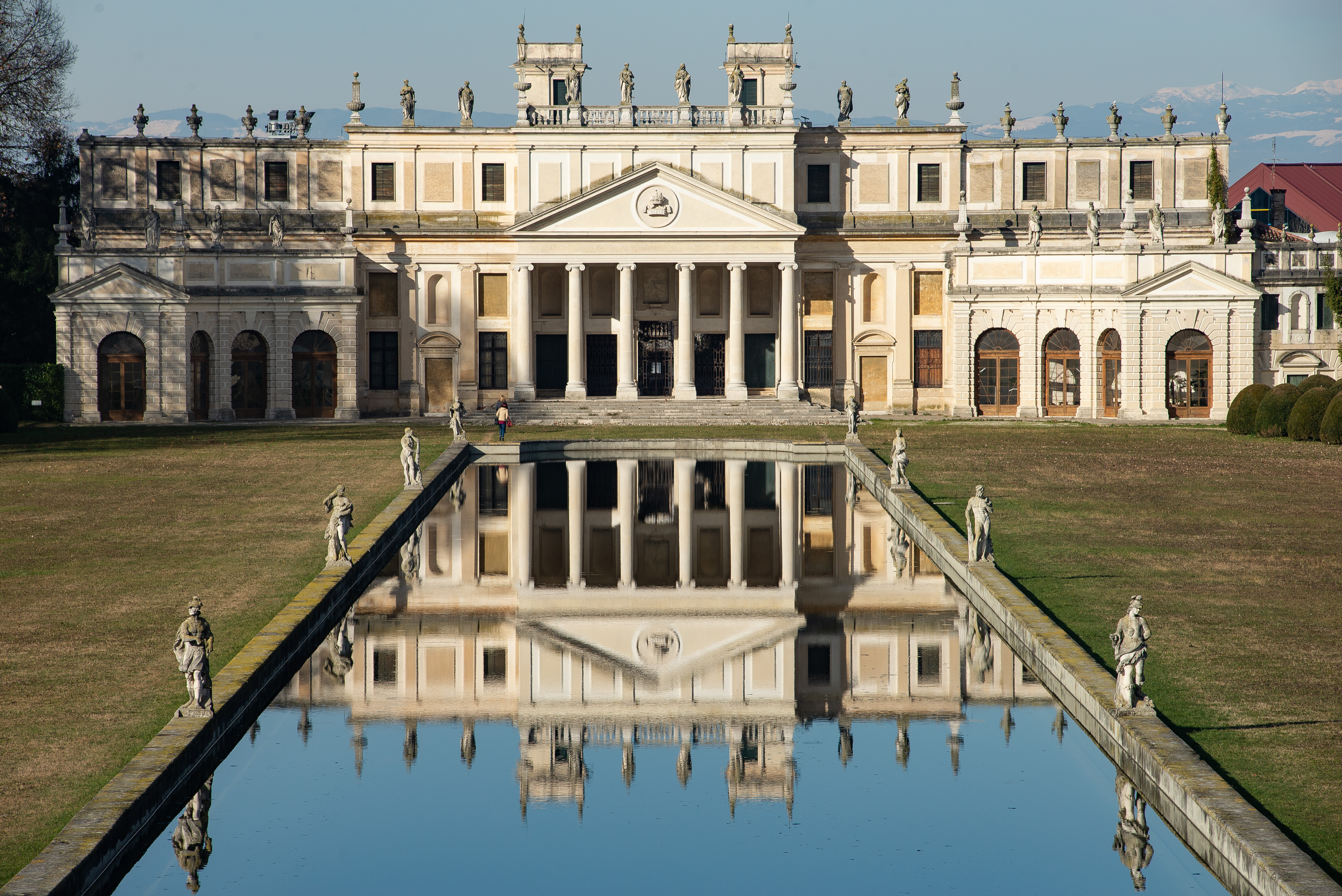 Porzione di Villa Pisani a Strà. (PD)